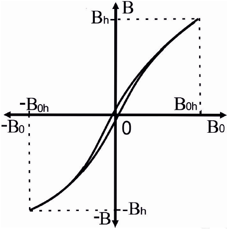 ասդքդսաղզ